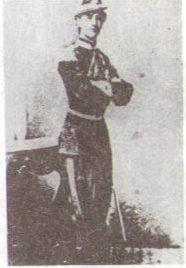 Марко Павлов в Наполеоновата армия